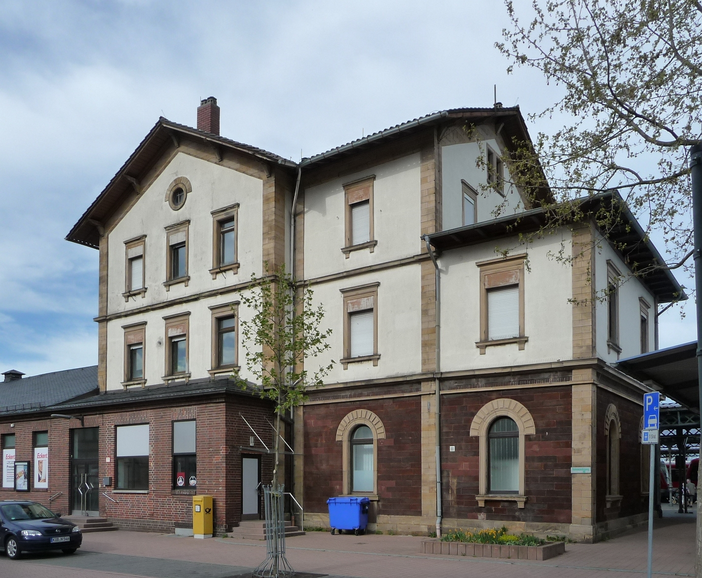 Grünstadt